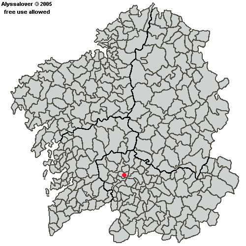 Situación de San Cibrao de Las en el Mapa de Galicia